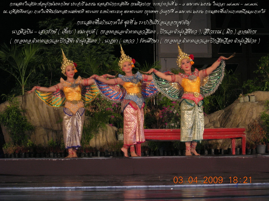 ระบำกินรีร่อนออกบูชายัญ นาฏศิลปิน - เสาวรักษ์ ( เจี๊ยบ ) ยมะคุปต์ ( กรองคอและผ้าคาดเอวสีแดง , ปีกและผ้านุ่งสีเขียว ), สิริวรรณ ( มิก ) อาจมังกร ( กรองคอ,ผ้าคาดเอวและปีกสีฟ้า ผ้านุ่งสีแดง ) , นาฏยา ( แหวว ) รัตนศึกษา ( กรองคอ,ผ้าคาดเอวและปีกสีเหลือง ผ้านุ่งสีม่วง ) ๒. ระบำกินรีร่อนออกบูชายัญ เป็นระบำชุดหนึ่งที่ท่านผู้หญิงแผ้ว สนิทวงศ์เสนี ผู้เชี่ยวชาญนาฏศิลป์ไทยและศิลปินแห่งชาติ ได้ประดิษฐ์ท่ารำให้มีลีลาอ่อนช้อย งดงาม กับทั้งสอดแทรกความร่าเริงของเหล่ากินรี ที่โผผินบินมาเริงระบำกันอย่างสนุกสนาน โดยให้เข้ากับท่วงทำนองและจังหวะเพลง บางครั้งรำก่อนมโนราห์บูชายัญ หรือบางครั้งก็รำต่อท้ายมโนราห์บูชายัญ